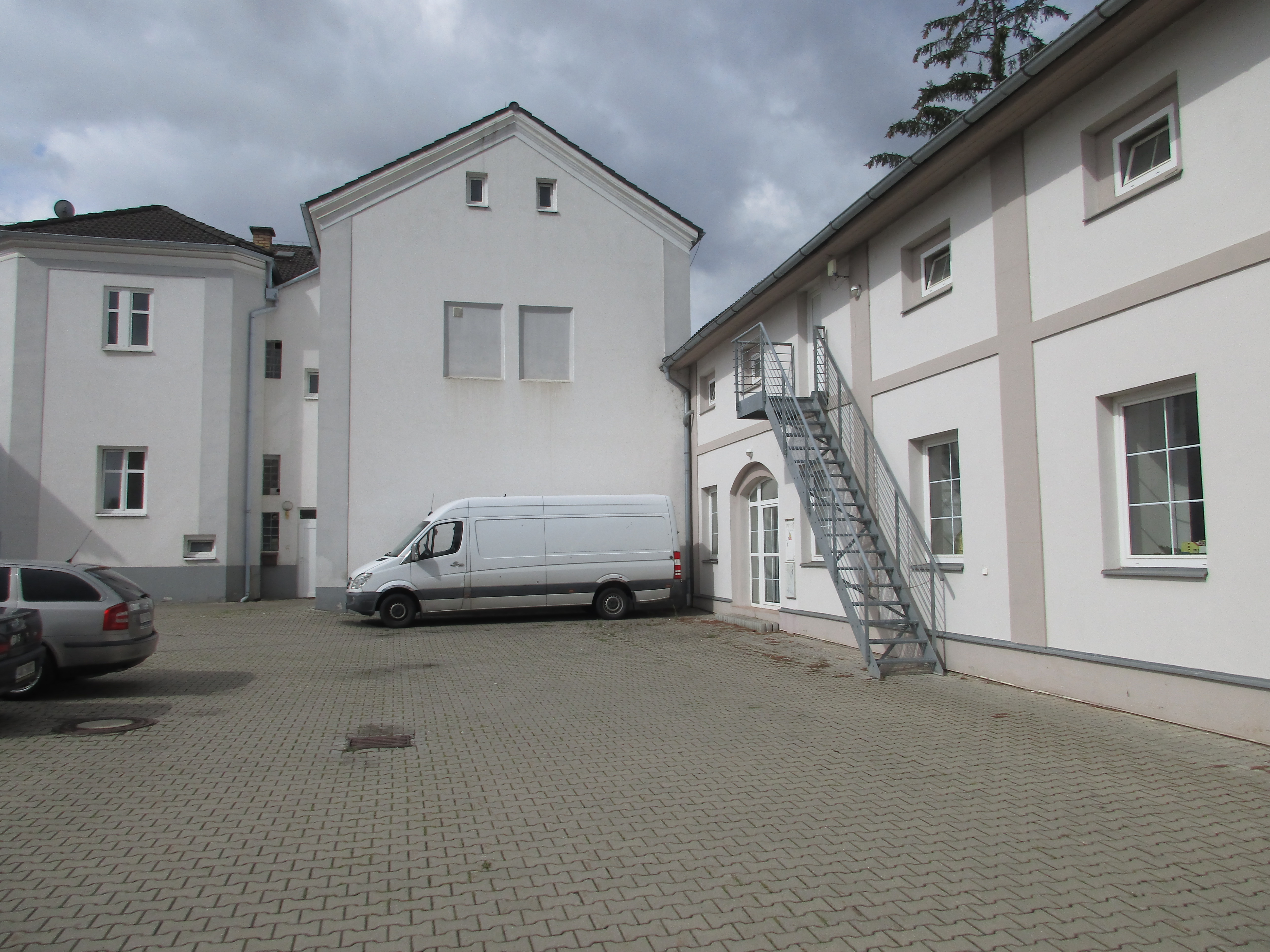 Cukrovar v Uhříněvsi - dochované budovy.